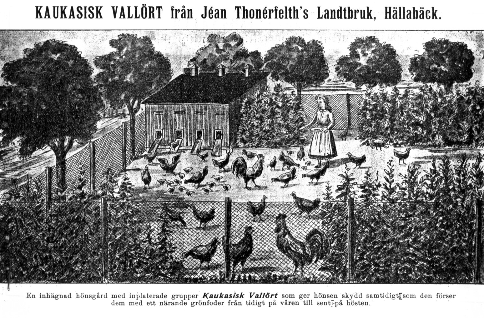 Illustration från reklambroschyr frpn tidigt 1900-tal. Avsändare Jéan Thonérfelth's Landtbruk.